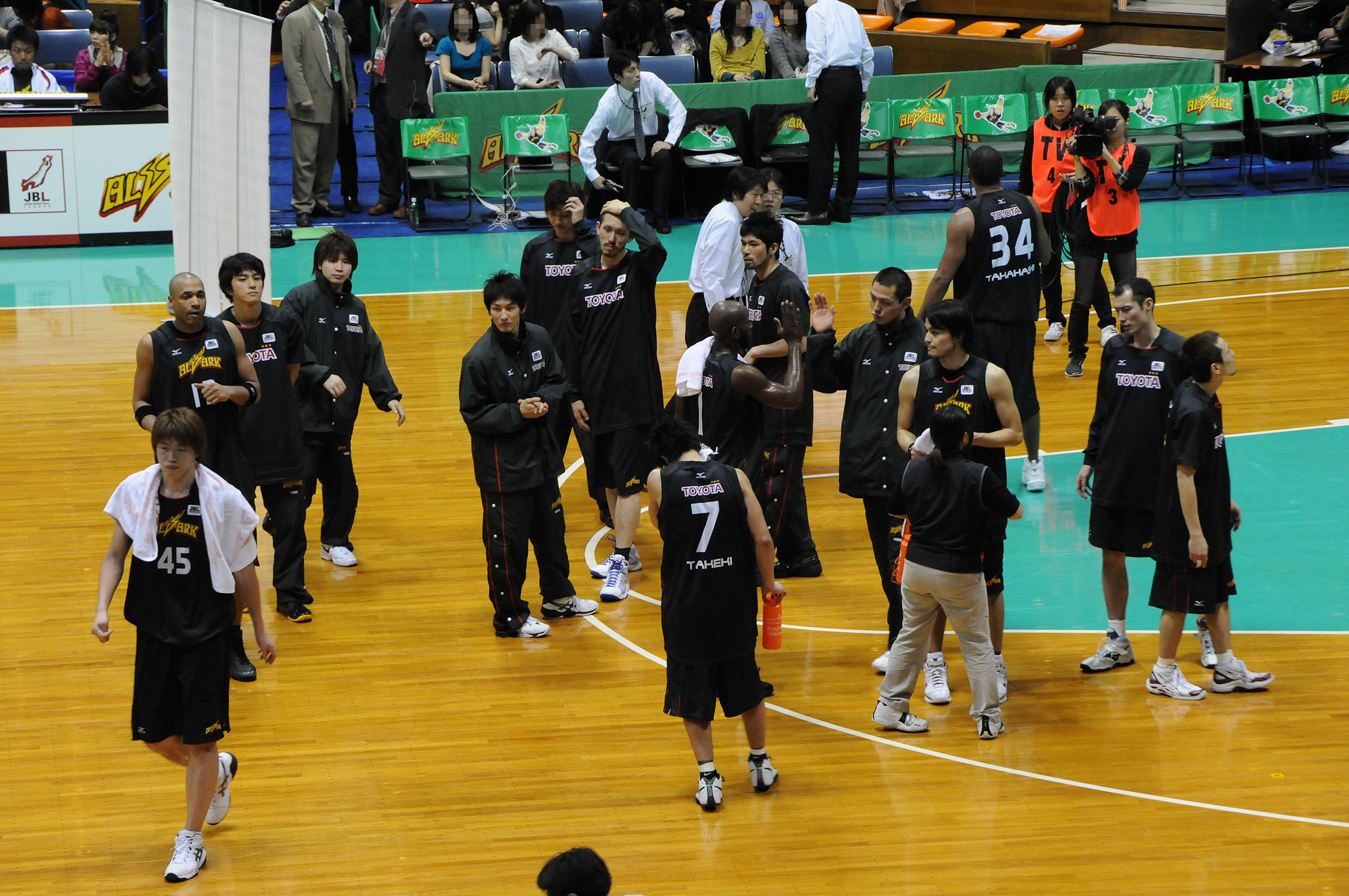 トヨタ自動車アルバルク、代々木第二体育館で。